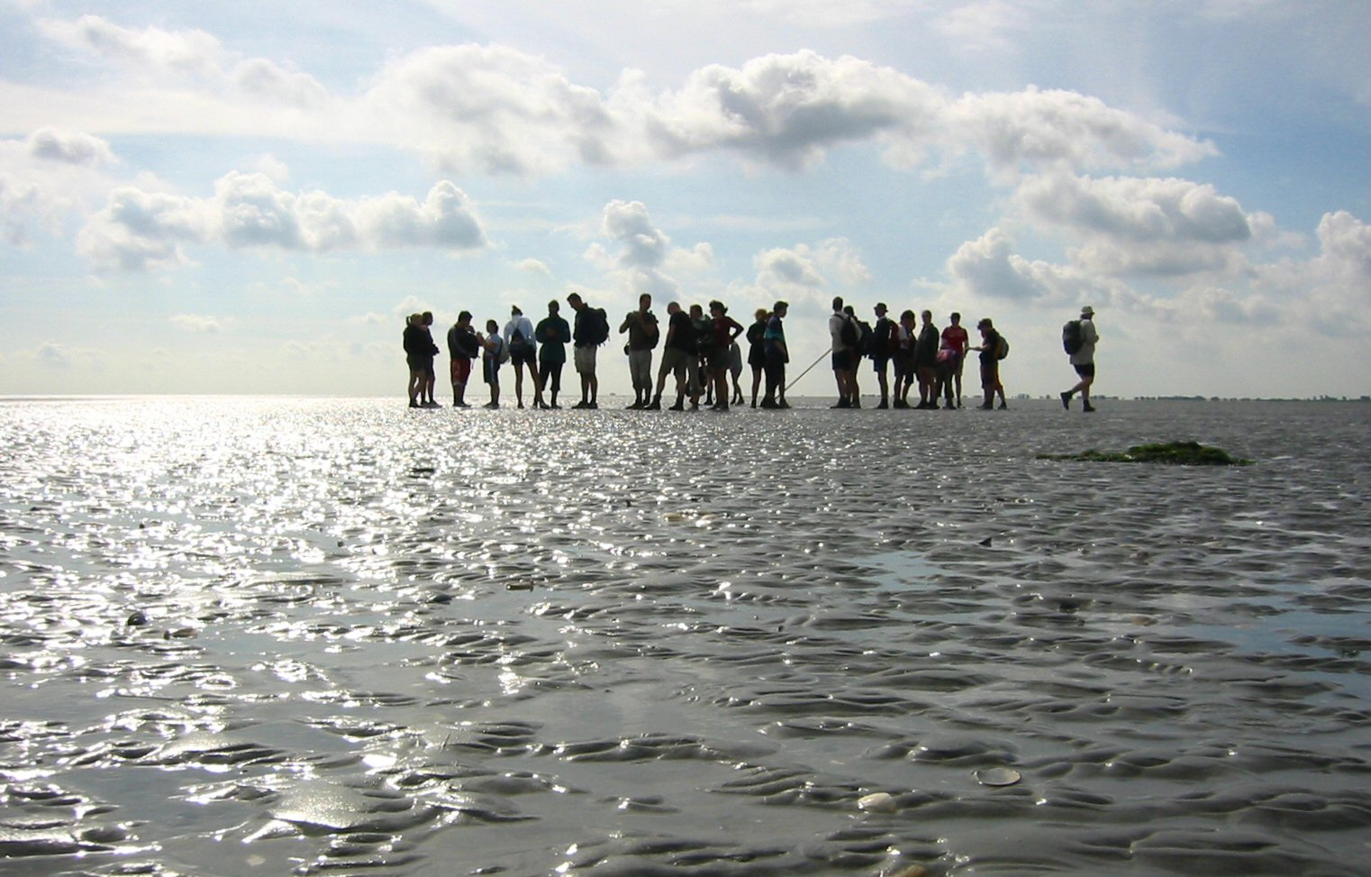 Image:Wadlopen bij Pieterburen 02.jpg, rotated 2 degrees and cropped